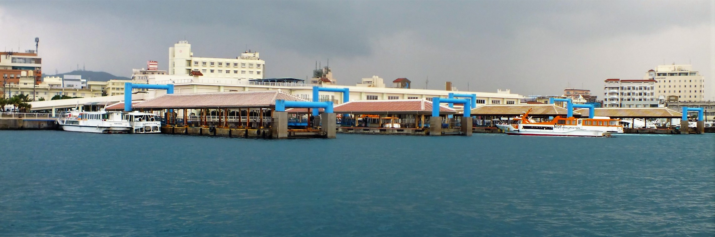 沖縄県の石垣港。 Ishigaki Port(IshigakiRitohTerminal) from the sea 海上から見る石垣港・離島ターミナル